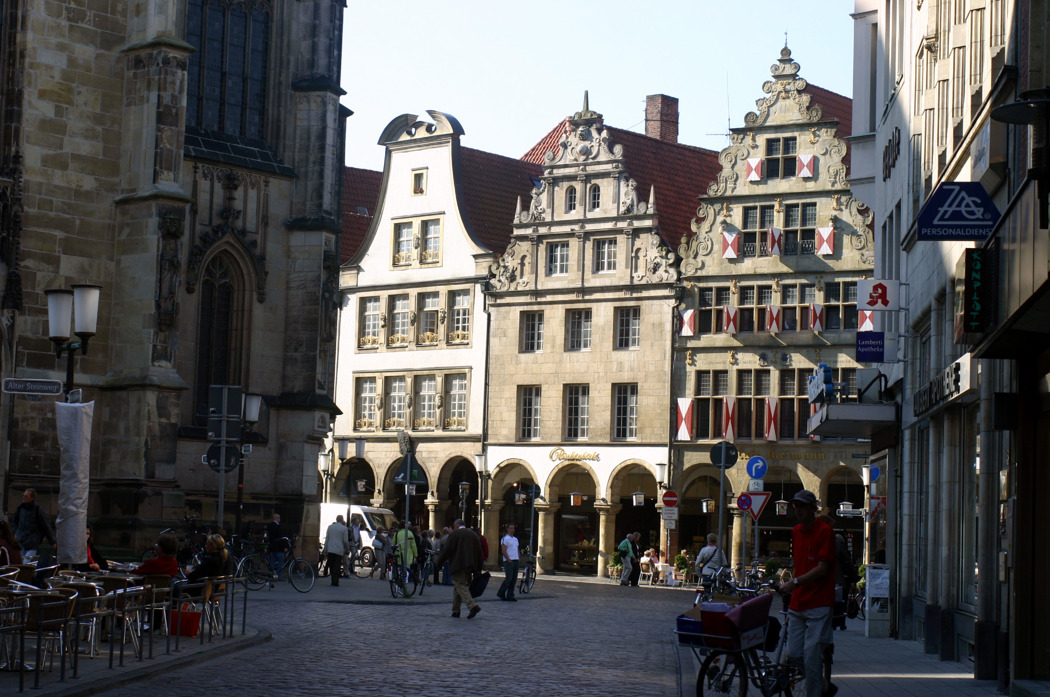 Münster, Prinzipalmarkt - vom Alten Fischmarkt aus gesehen